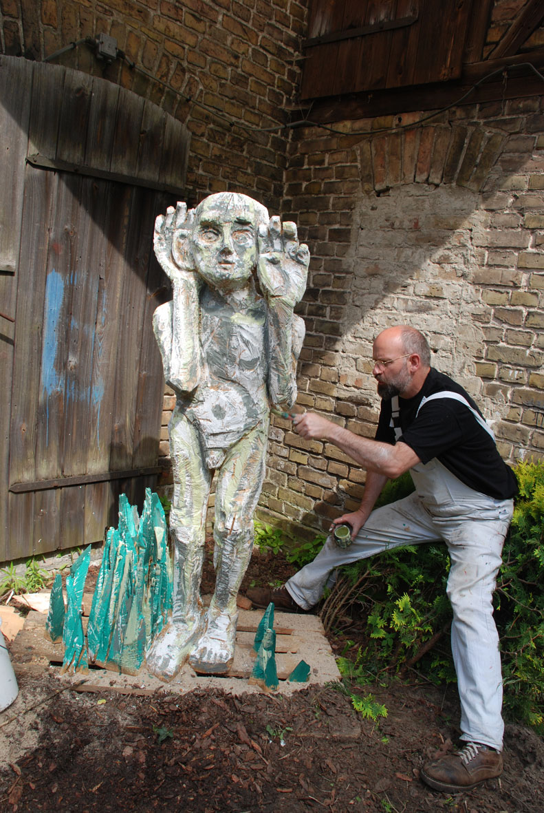 Holzplastik, bearbeitet von Rainer Ehrt